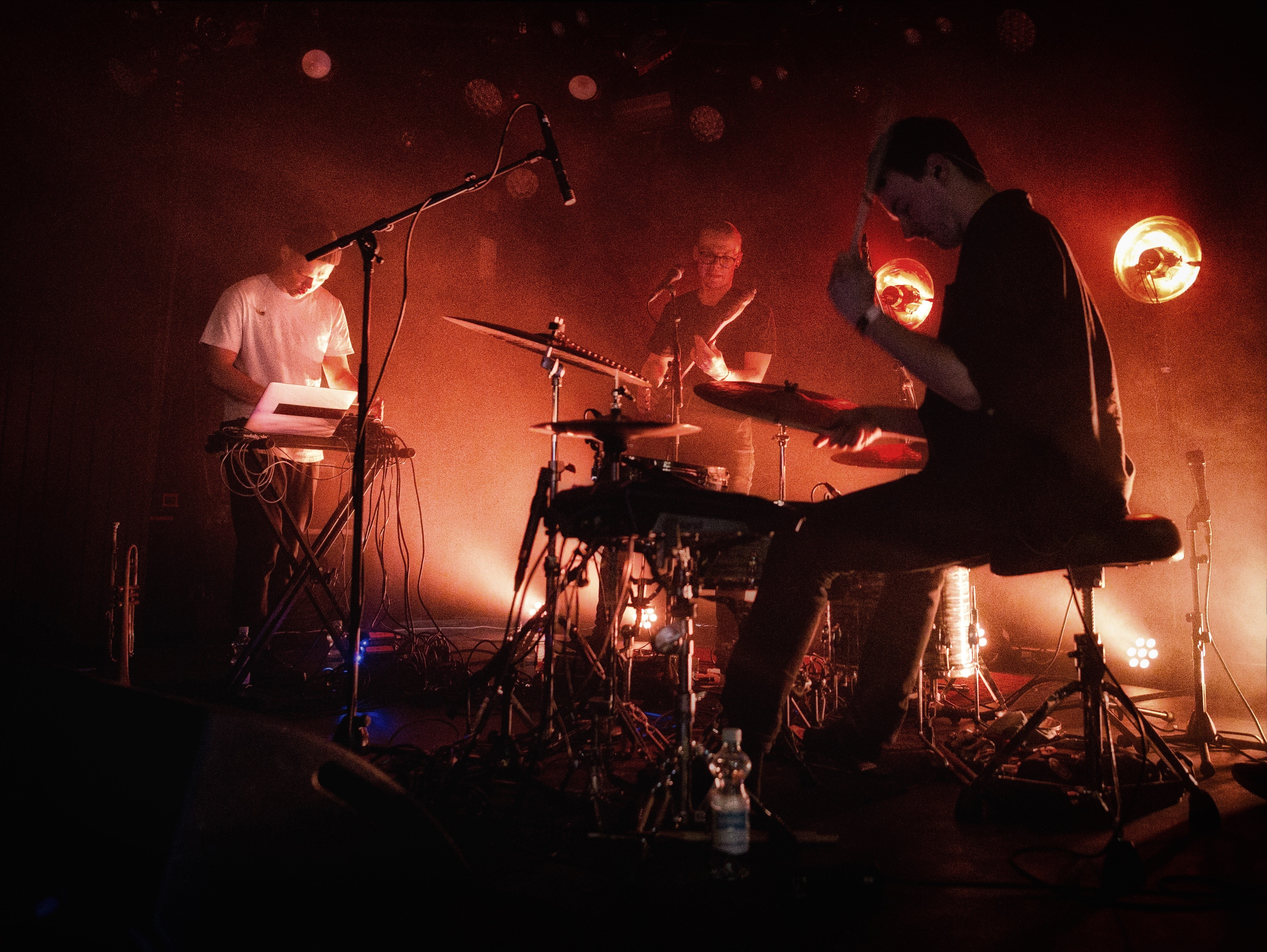 VIRTA live at On the Rocks, Helsinki. Photo by Jari Flicnk